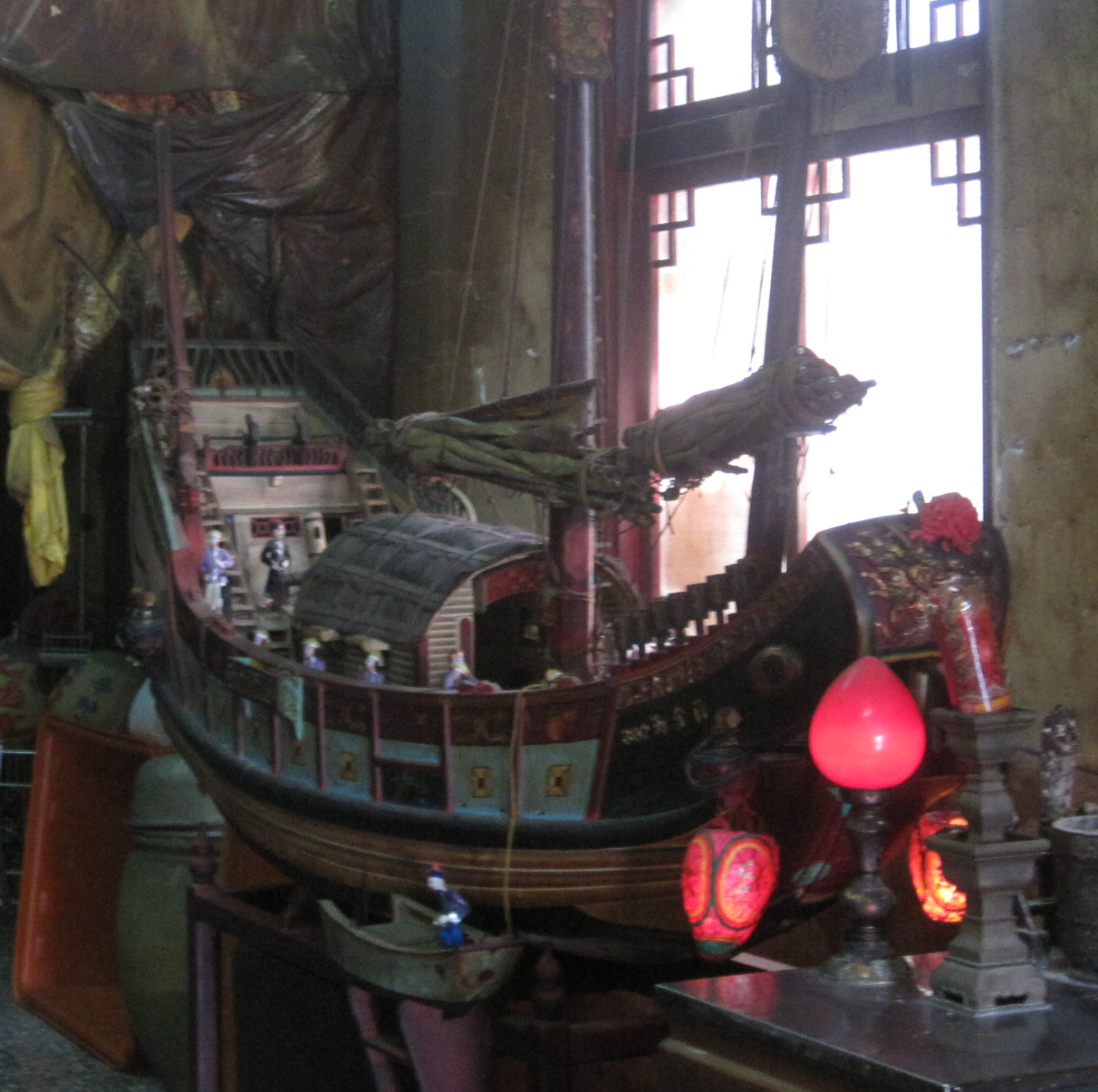 王船薛金海號